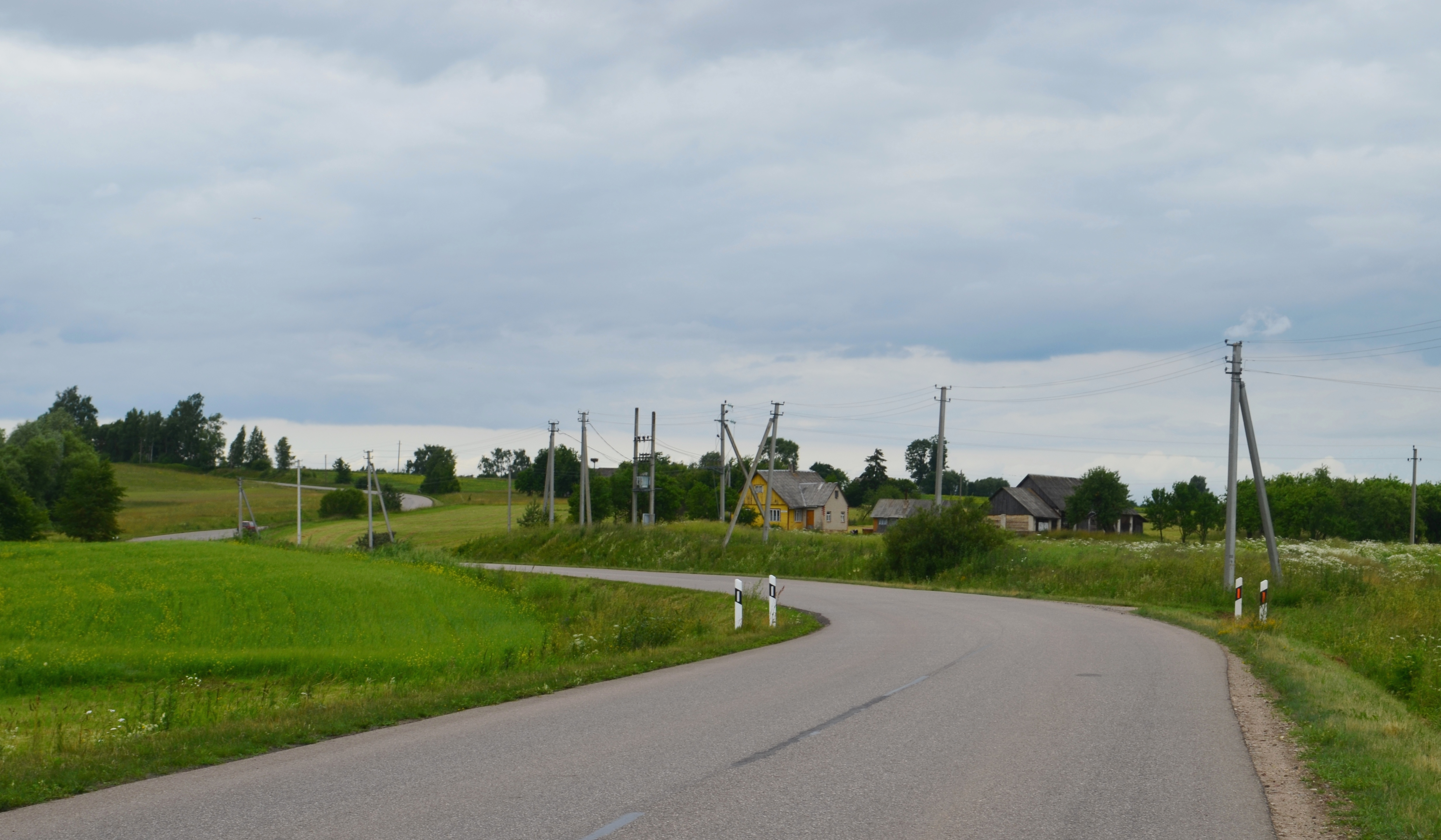 Liciškėnai, Prienų raj.